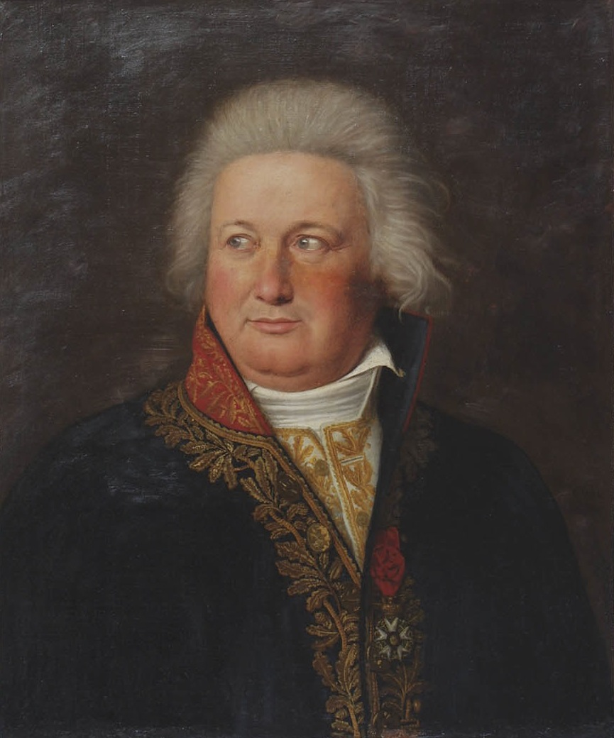 Jean-Pierre Lacombe-Saint-Michel